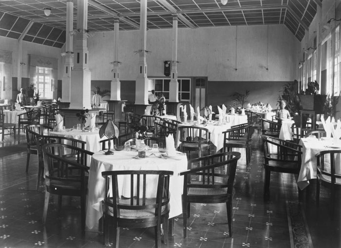 Foto. Eetzaal in het Grand Hotel Lembang